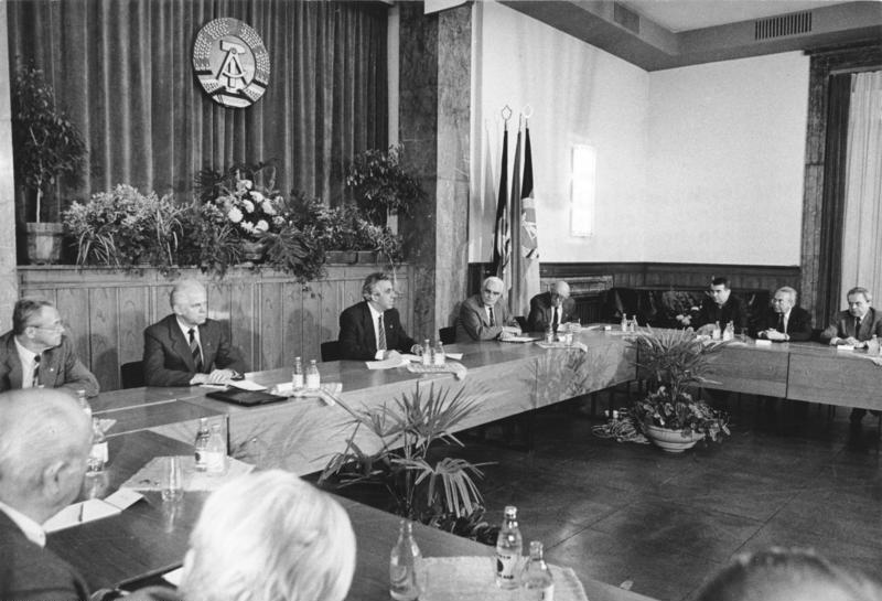 Berlin, Treffen des Zentralen Demokratischen Blocks ADN-ZB/Mittelstädt/18.10.1989/Berlin: Treffen/Unter dem turnusmäßigen Vorsitz der SED trat im Haus des Nationalrates der Zentrale Demokratische Block der Parteien und Massenorganisationen zusammen. An dem Treffen nahmen u.a. teil der Generalsekretär des ZK der SED, Egon Krenz, der Vorsitzende der LDPD, Prof. Dr. Manfred Gerlach (l), der Vorsitzende der DBD, Dr. Günther Maleuda (2.v.l.), der Vorsitzende der CDU, Gerald Götting (4.v.l.), der Vorsitzende der NDPD, Dr. Heinrich Homann (5.v.l.), der 1. Sekretär des Zentralrates der FDJ, Eberhard Aurich (6.v.l.), der Präsident des Kulturbundes, Prof. Dr. Hans Pischner (/.v.l.), der Präsident des Nationalrates der Nationalen Front, Prof. Dr. Dr. Lothar Kolditz (8.v.l.).